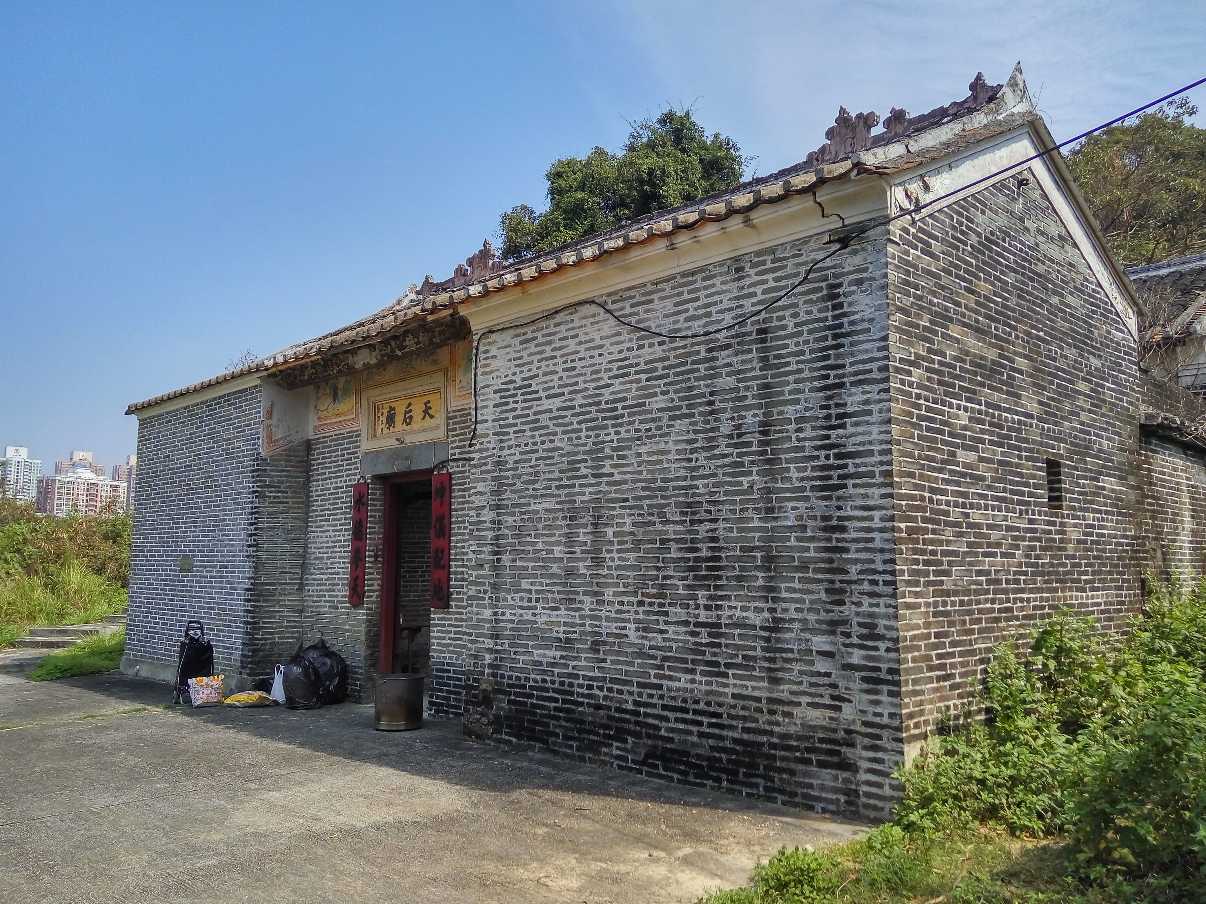 中文（香港）: 文錦渡木湖村天后廟